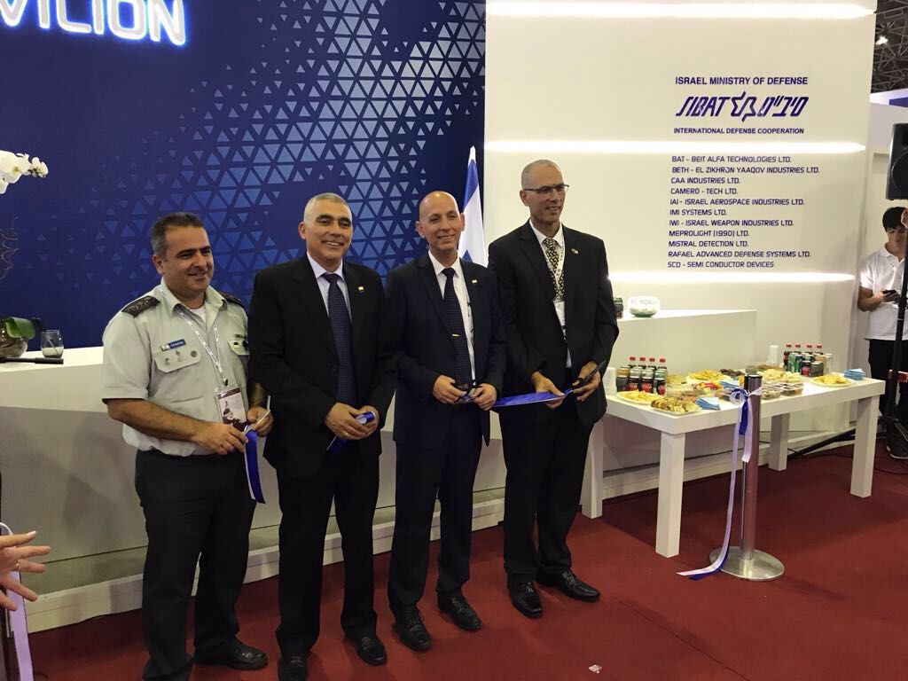 בברזילעם משלחת סיב"ת LAAD יוסי שלי בפתיחת תערוכת